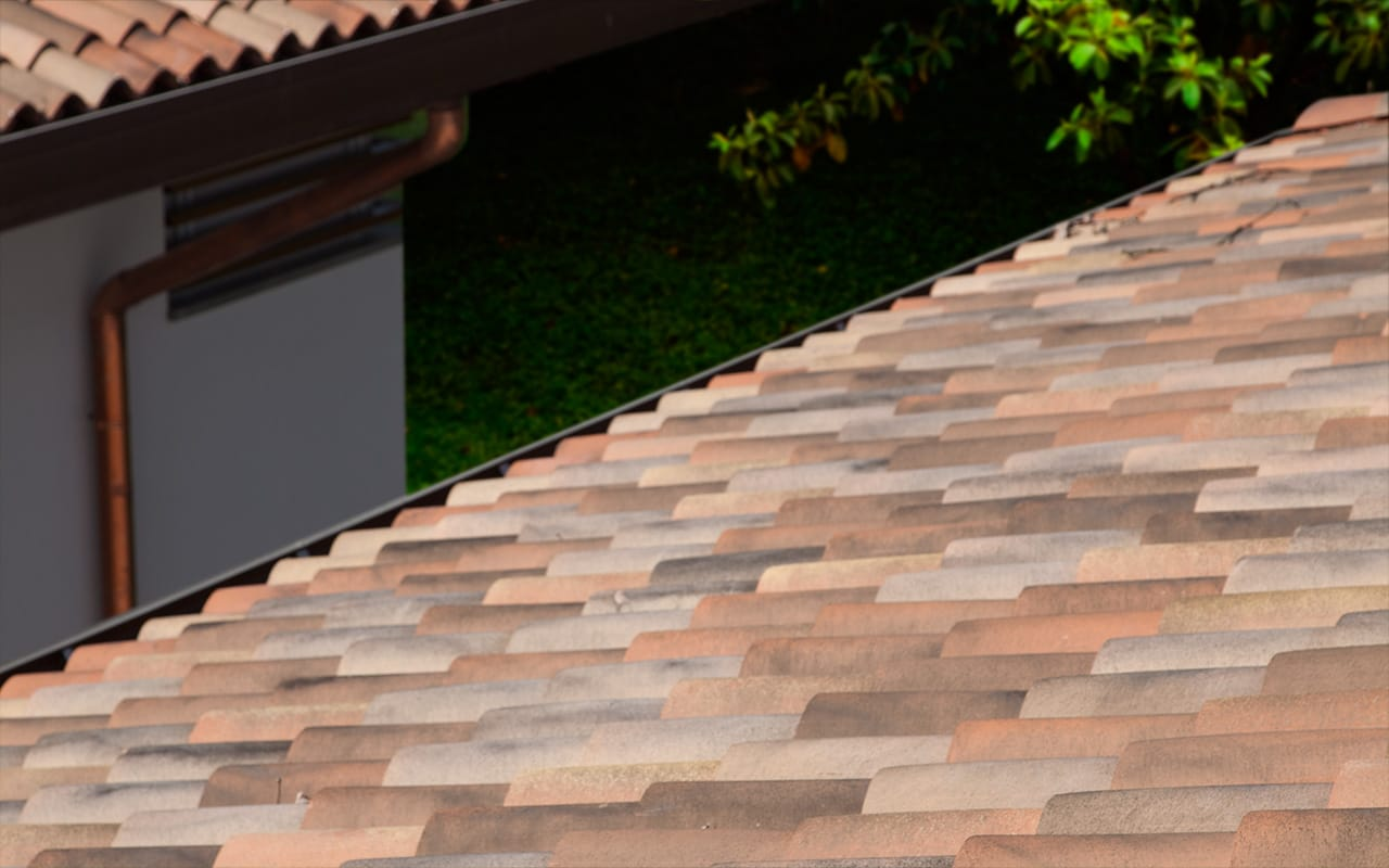 Foto di un tetto in laterizio scattata durante un mio sopralluogo. La trovo più pertinente rispetto a quella già inserita nel sito